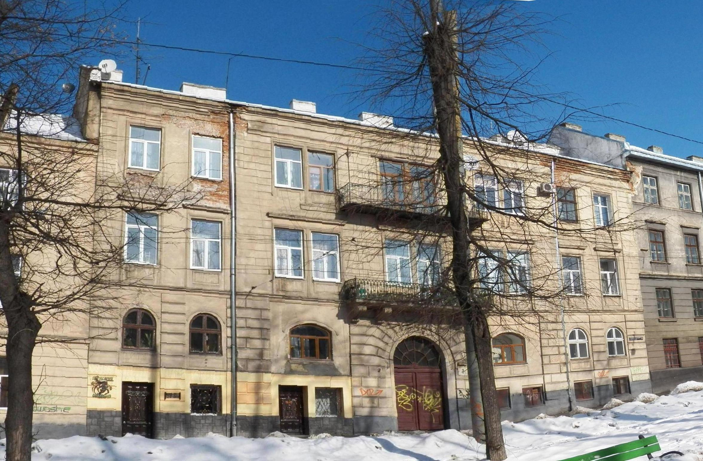 житловий будинок, Львів, Галицького Д. пл., 3